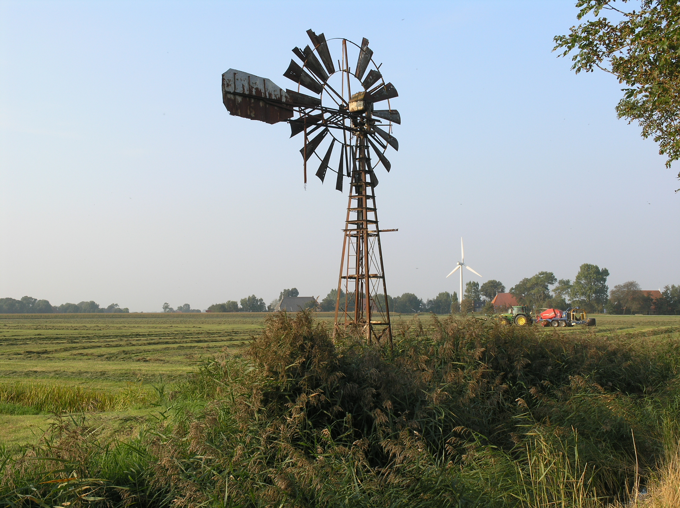 Ites Windmotor